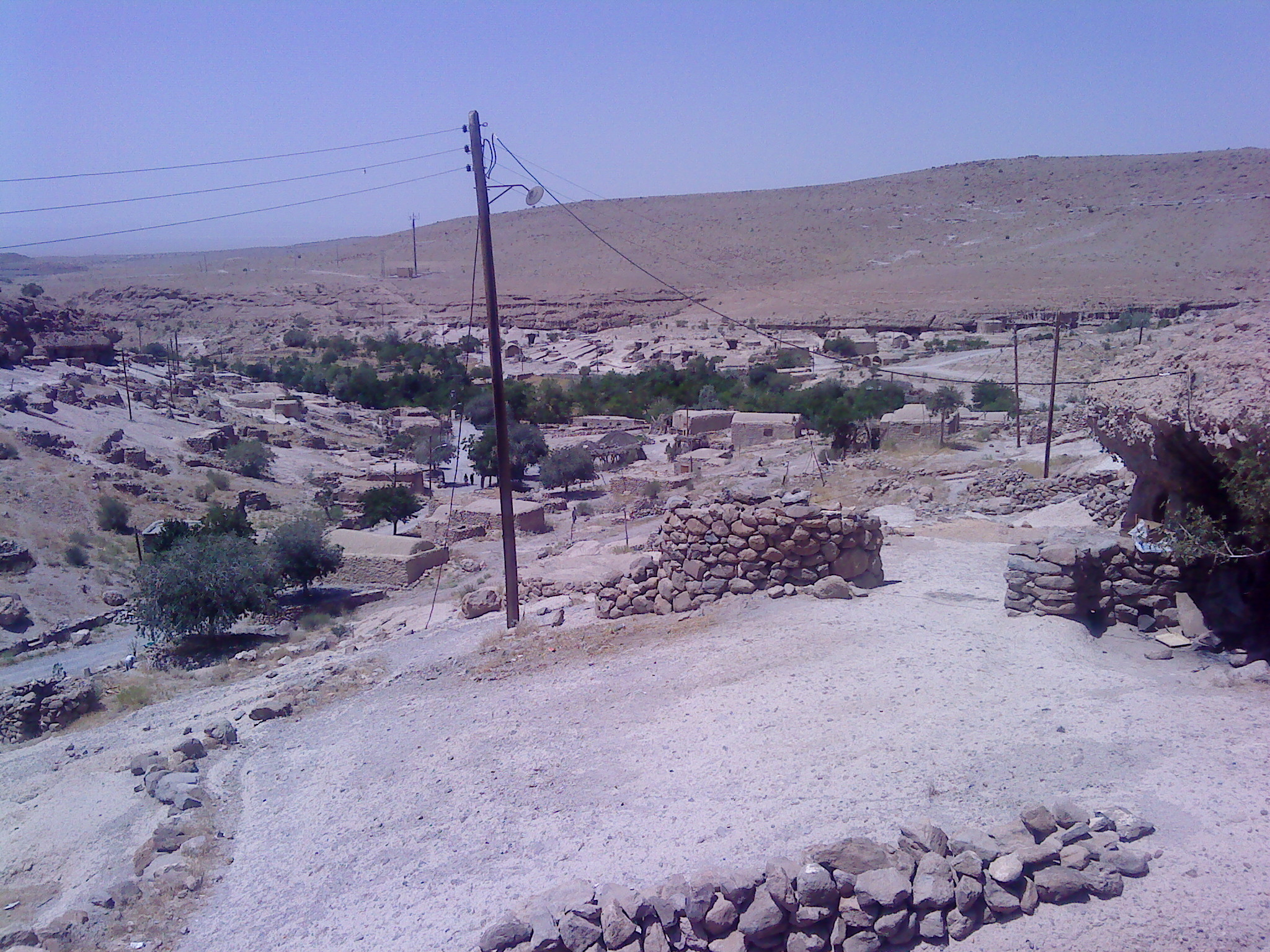 نمایی از میمند